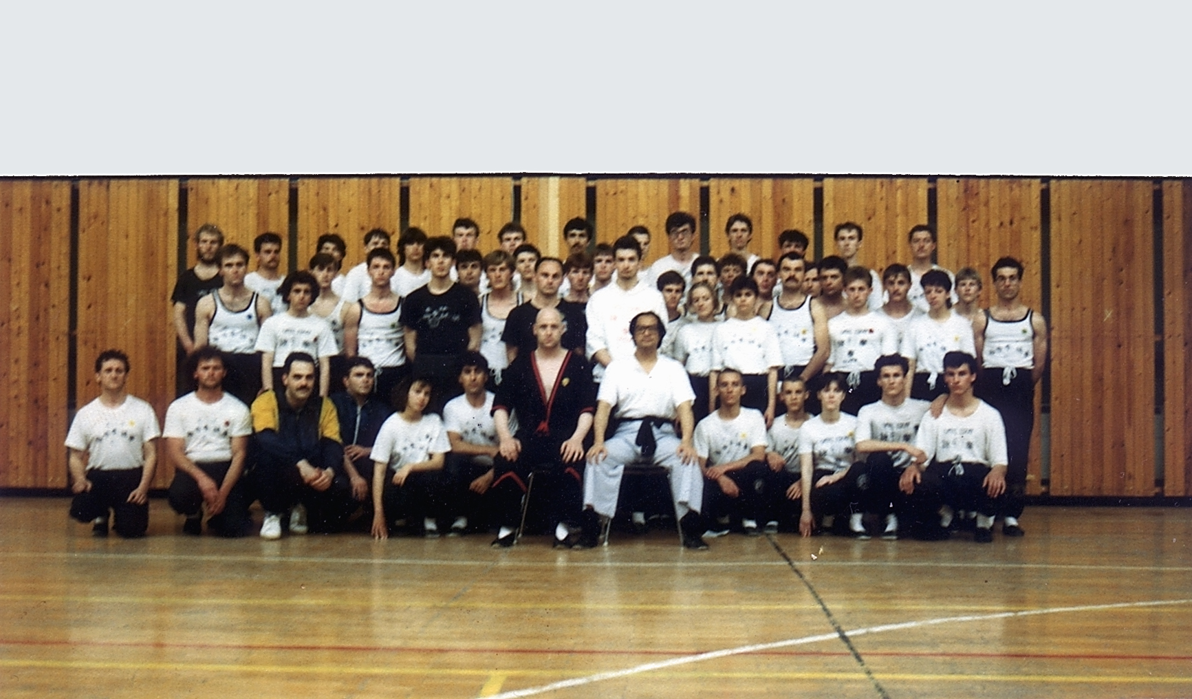 participare la primul seminar al Ungariei cu dr. Leung Ting Si Gung Cristian Butaru si D.D in mijlocul paginii